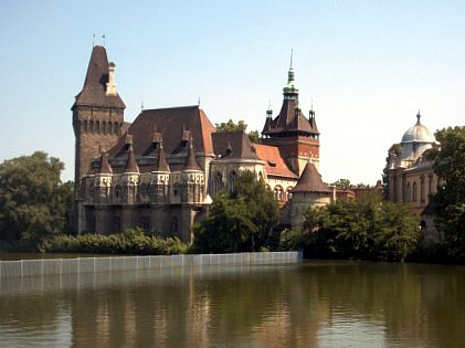 Vajdahunyad Castle in Budapest